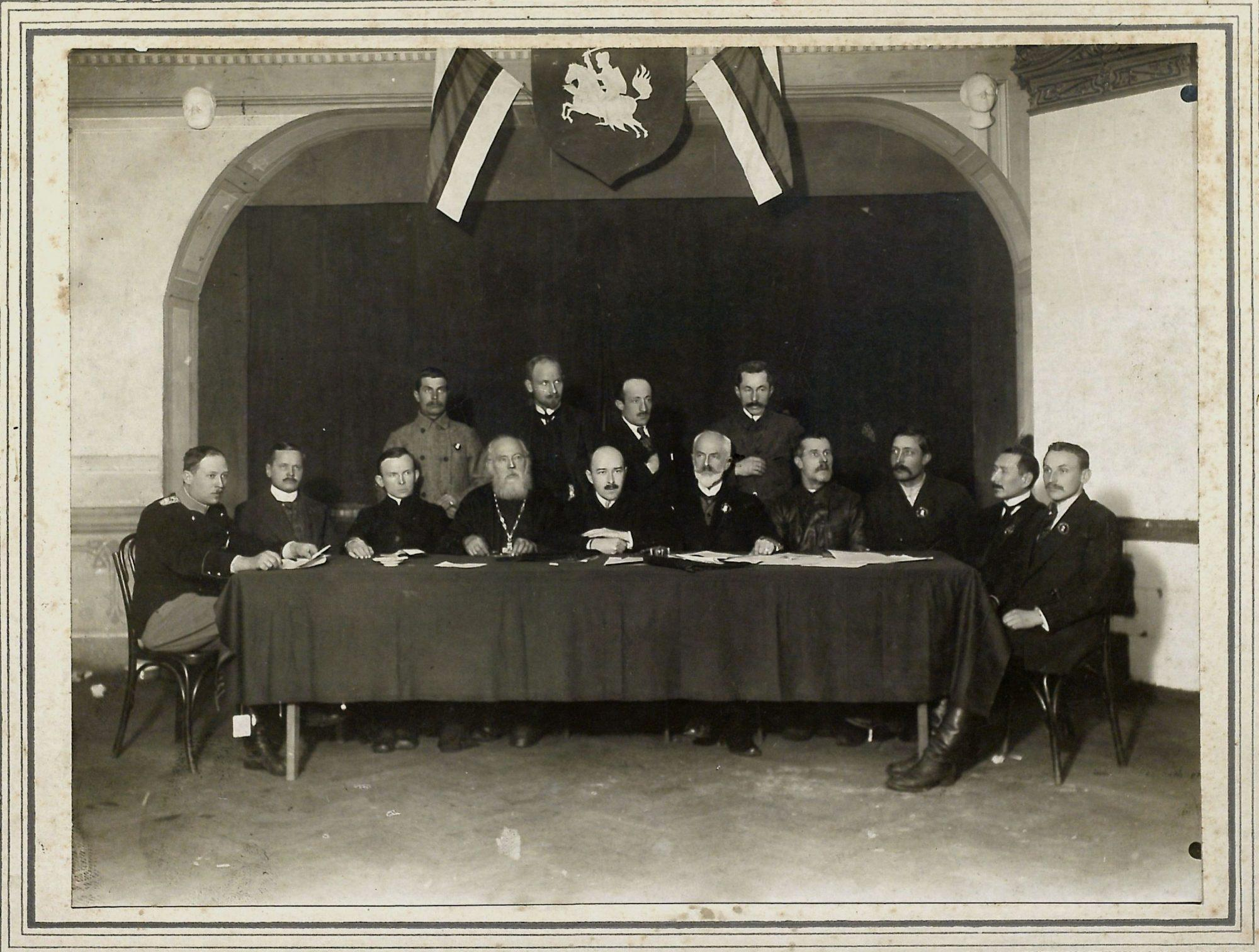 Беларуская (тарашкевіца): Прэзыдыюм беларускае канфэрэнцыі ў Вільні ( 25—28 студзеня 1918)